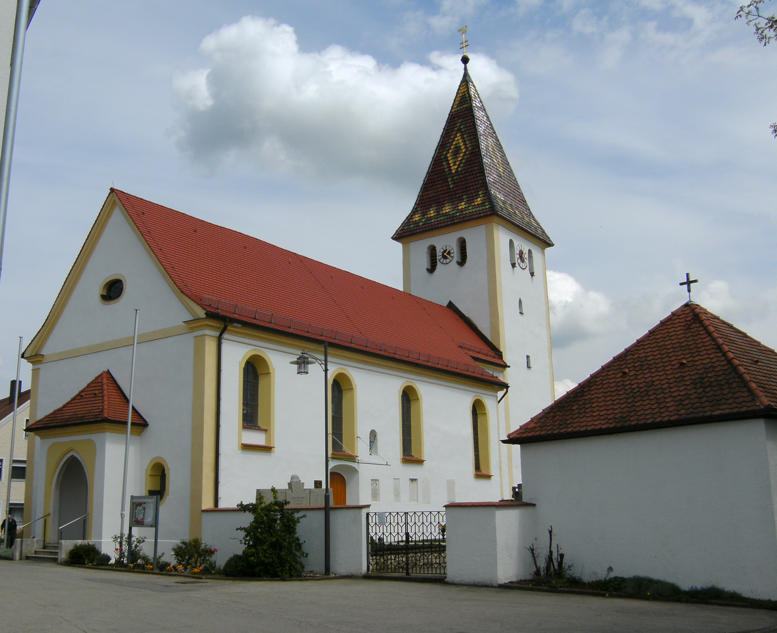 Kirche in Zell, Ortsteil der Gemeinde Dietfurt an der Altmühl im Landkreis Neumarkt in der Oberpfalz in Bayern